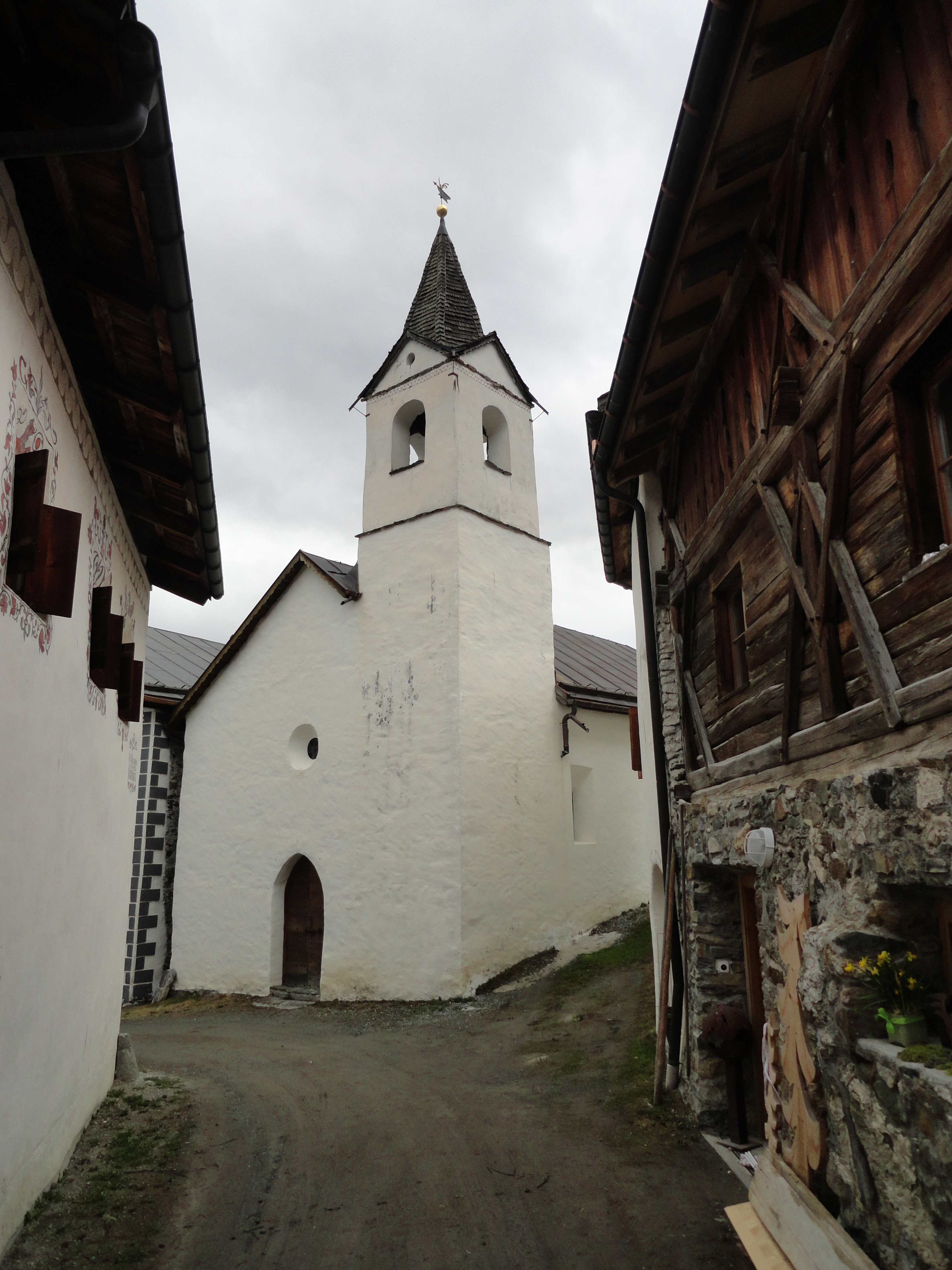 Reformierte Kirche Sur En (Ardez)